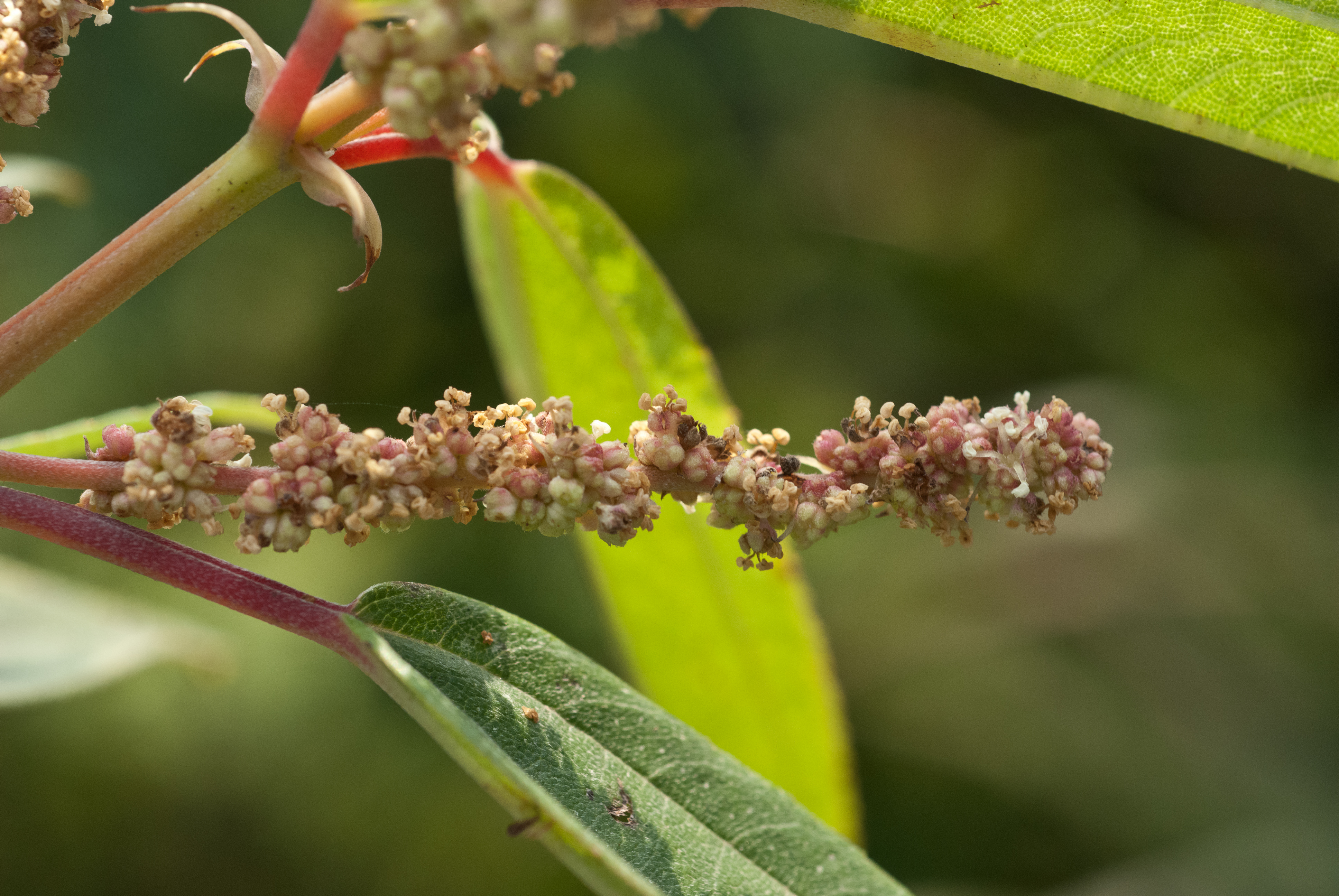 Boehmeria densiflora inflorescence